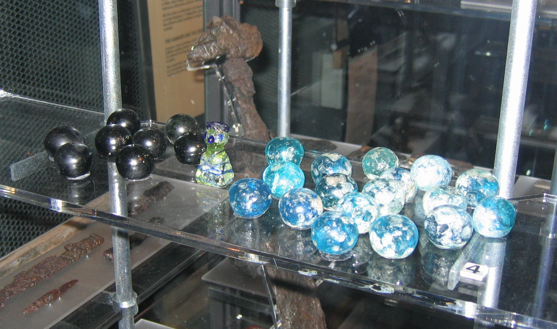 pawns